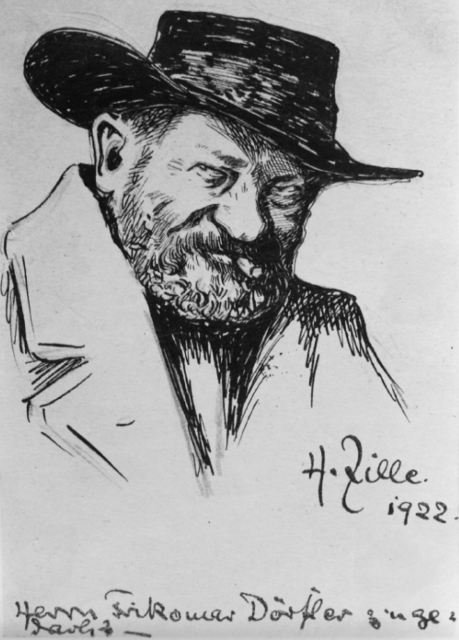 Heinrich Zille (* 10. Januar 1858; † 9. August 1929), Grafiker, Lithograf, Maler, Zeichner und Fotograf. Selbstporträt.